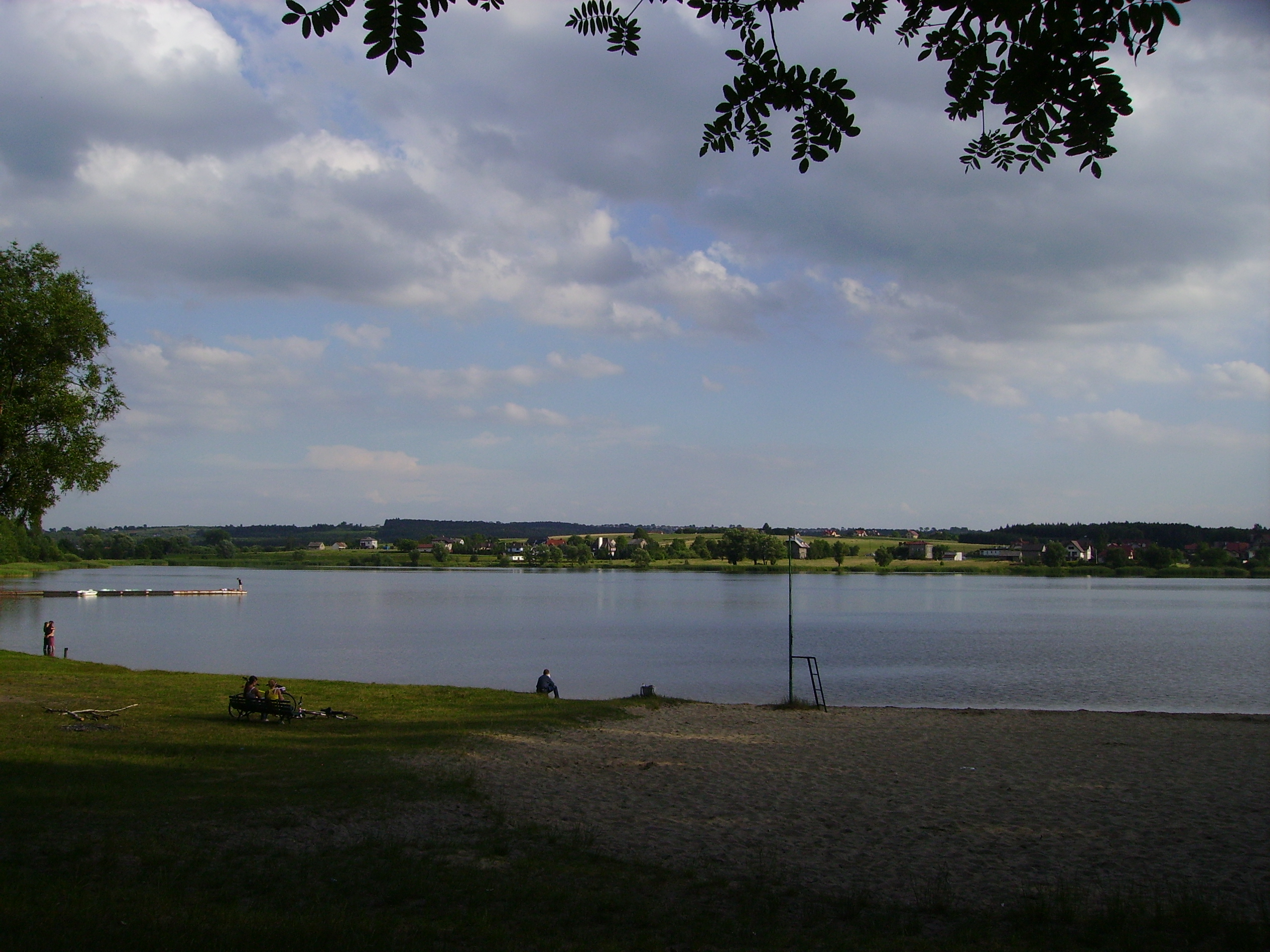 zalew chechło w Trzebini